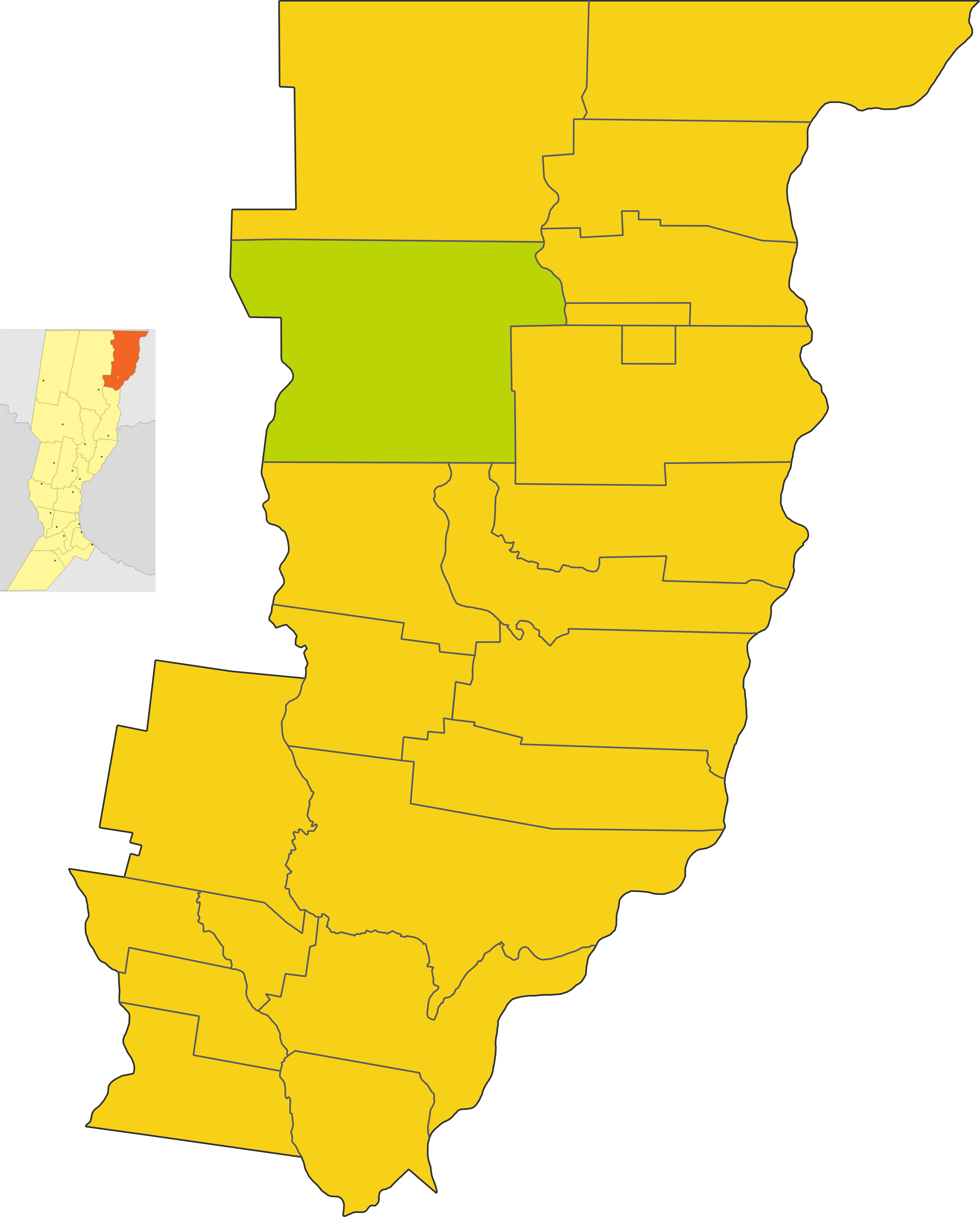 Map of the comuna de Villa Ana in General obligado department, Santa Fe province, Argentina